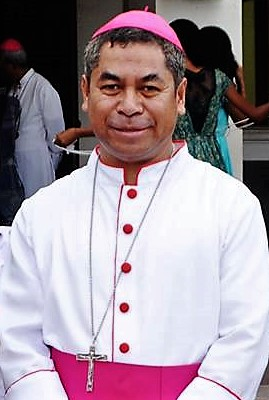 Tetun: Virgílio do Carmo da Silva